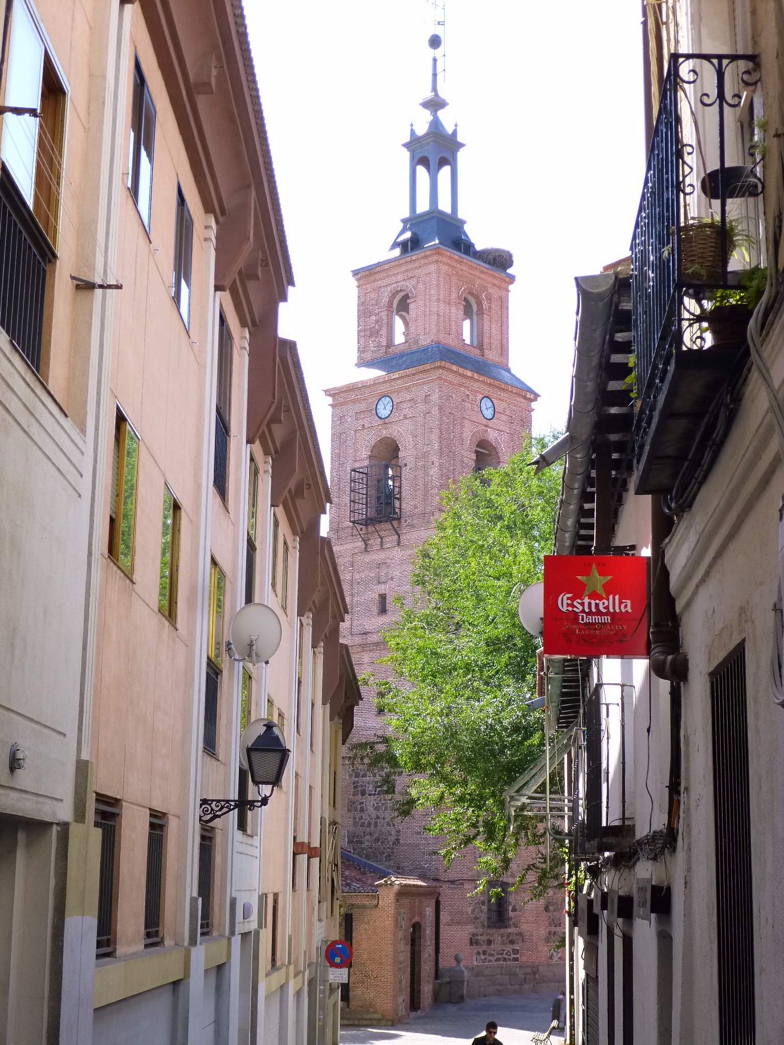 Iglesia de Santa María la Antigua (Vicálvaro, Madrid)